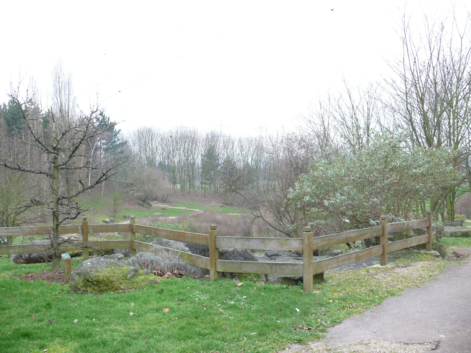 VILLETANEUSE : le Parc départementral